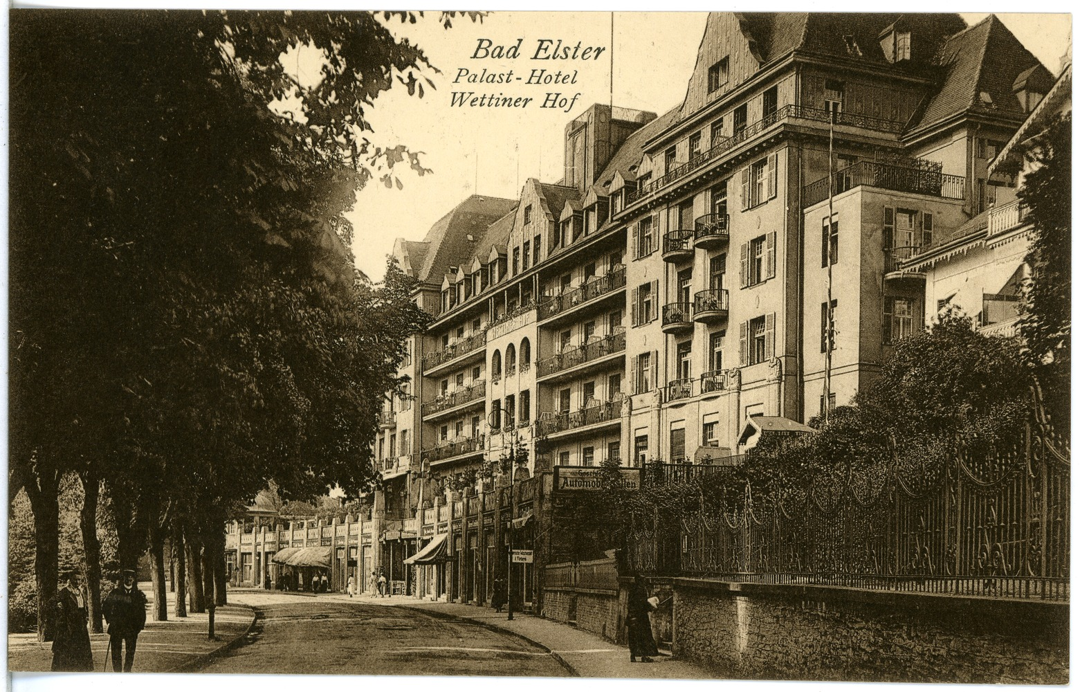 Bad Elster; Wettiner Hof This postcard is from publisher Brück & Sohn in Meißen ( postcard has a unique number 20496 and is available in a higher resolution at the publisher. This images was uploaded in a cooperation project between Wikipedians and the publisher.